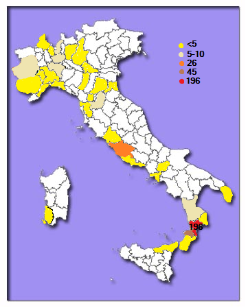 Diffusione del cognome Giampà